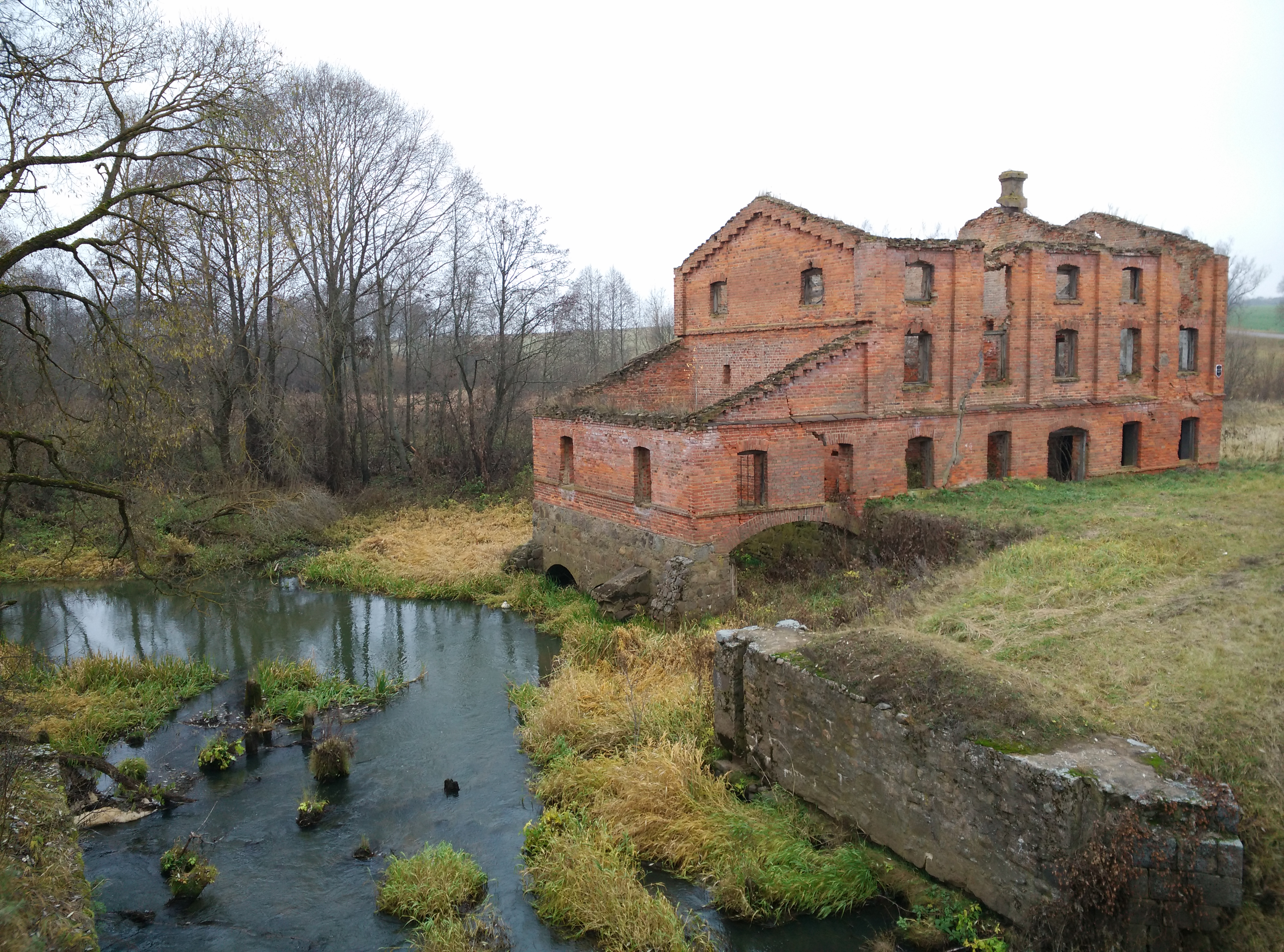 Вадзяны млын ля вёскі Каменнае Крывое.